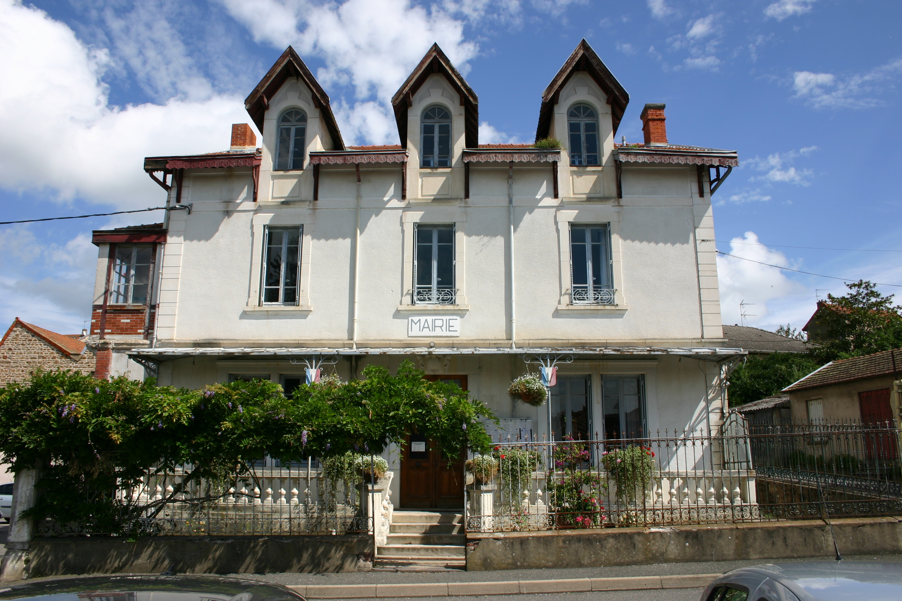 Mairie de Bussières dans le département de la Loire.